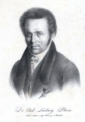 Carl Ludwig Blum